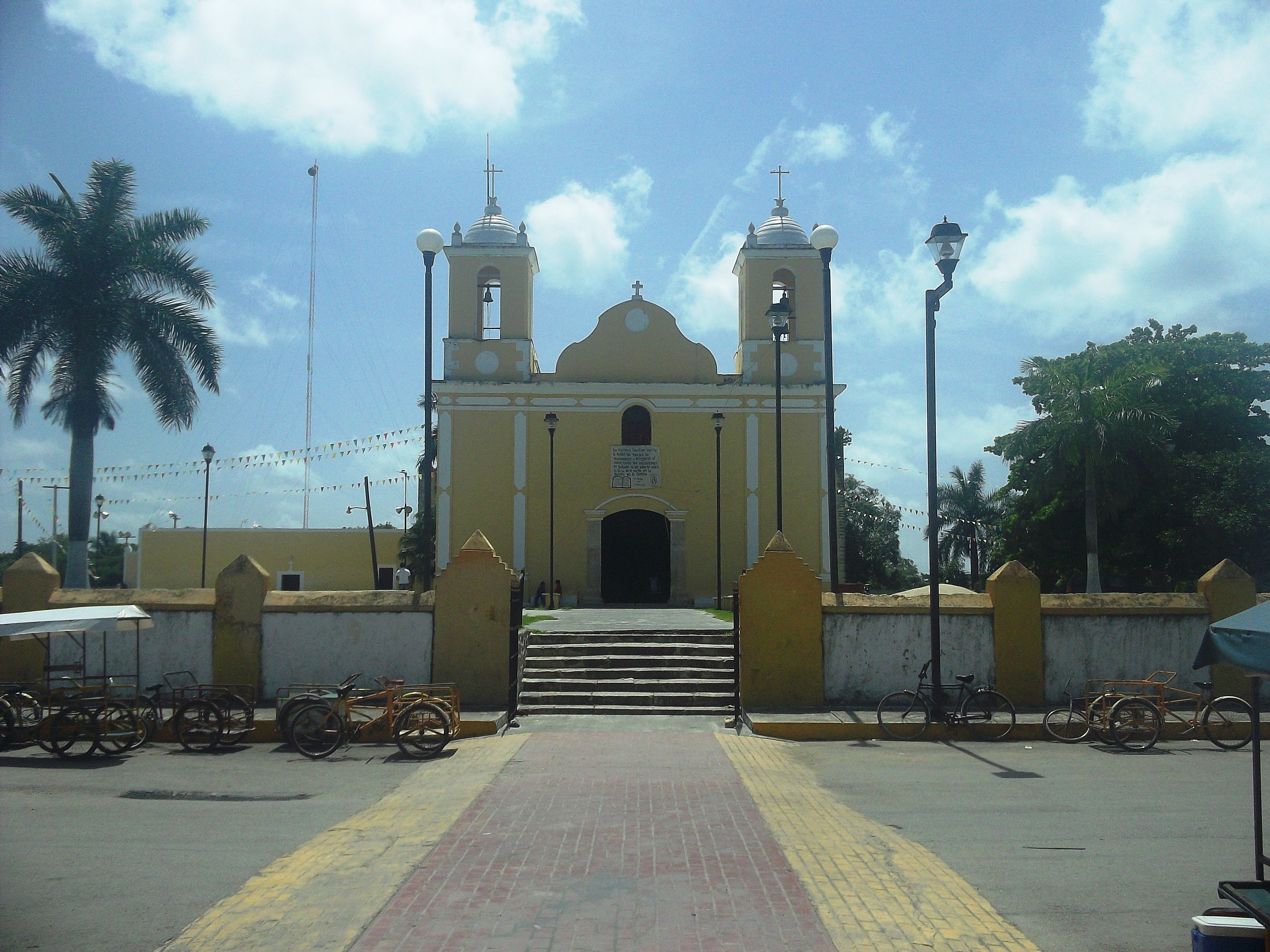 Iglesia de Kinchil, Yucatán.